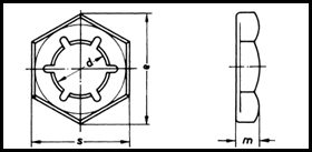 DIN 7967